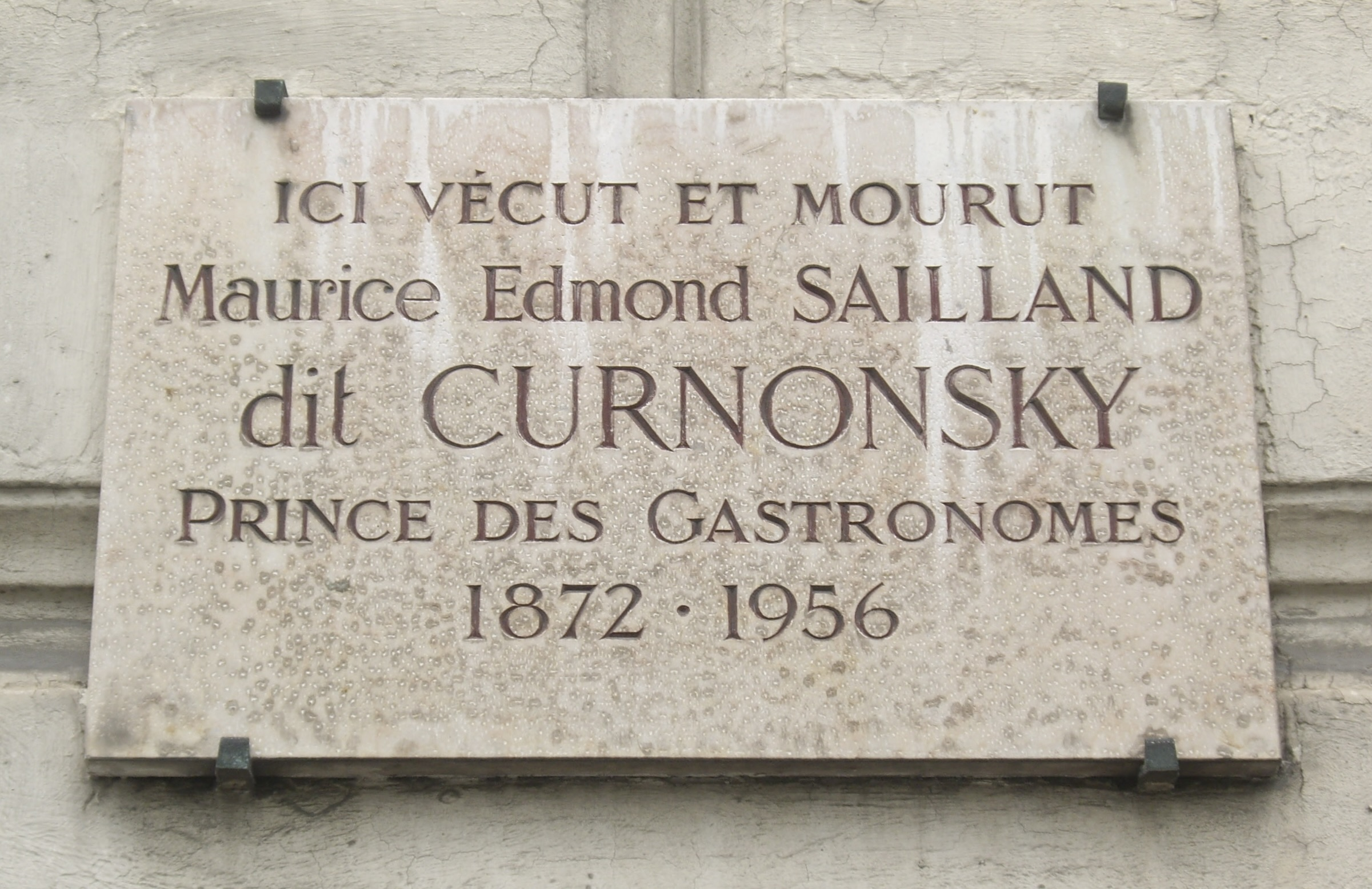 Plaque apposée au n° 14 de la place Henri-Bergson, Paris 8e, où vécut et mourut défenestré le critique gastronomique Maurice Edmond Sailland (1872-1956), dit Curnonsky, « le prince des gastronomes ».